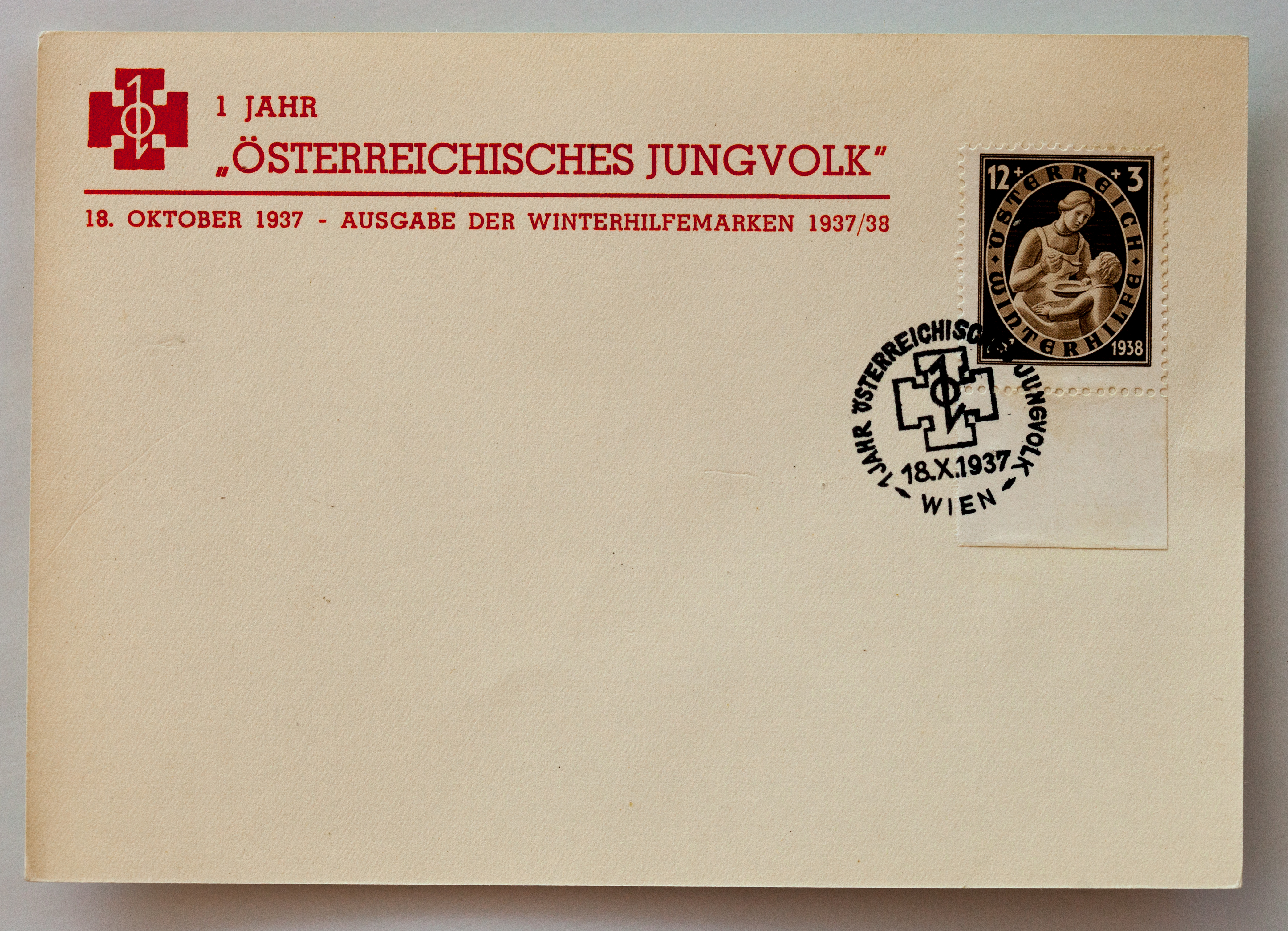 Feldpostbriefe von Hans Koch, Wien, 2. Weltkrieg, Ostfront, 1922-1945